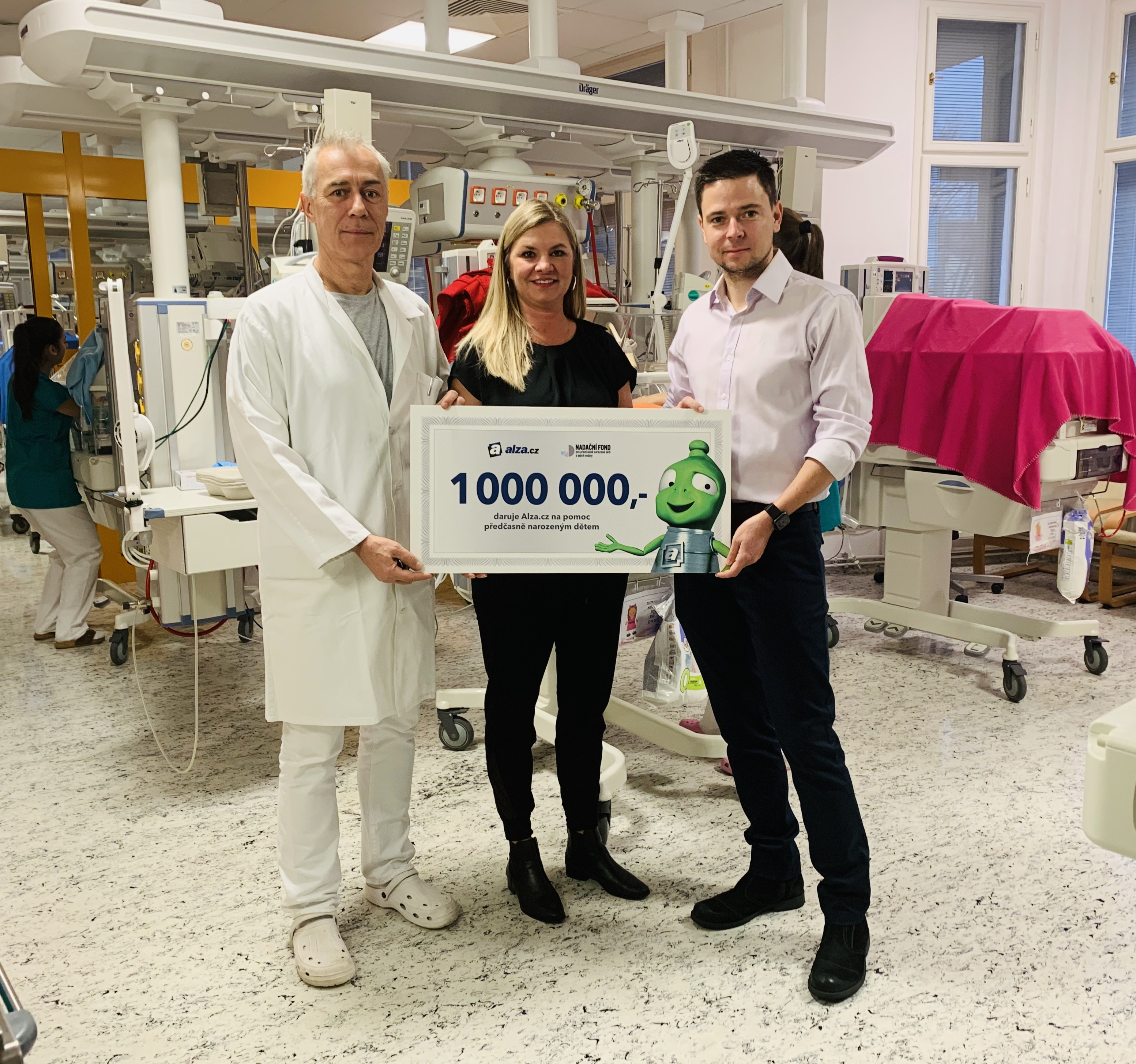 Předávání šeku pro nadaci pro předčasně narození děti, nadaci předává Jan Moudřík